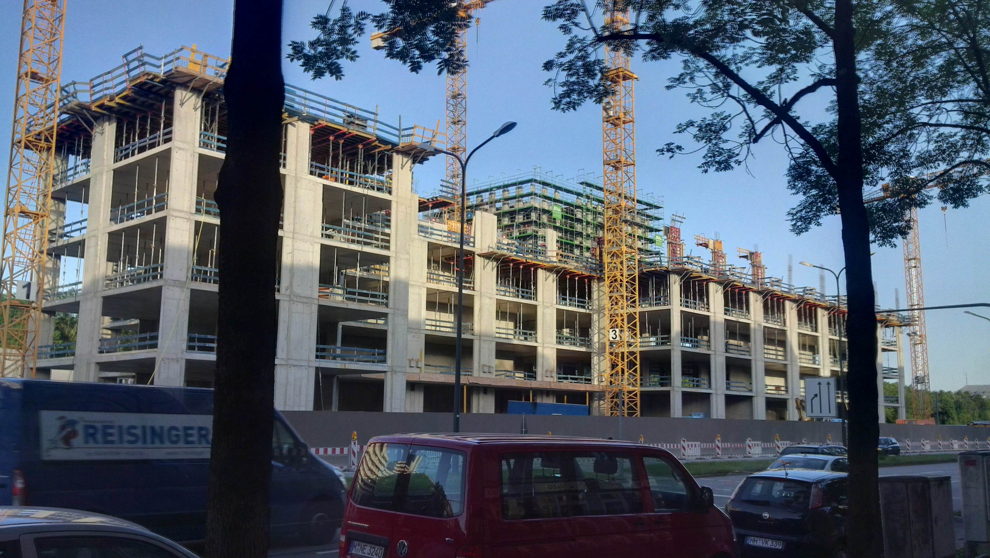 Baustelle des Stadtquartiers Schwabinger Tor in München am 8. Juni 2014